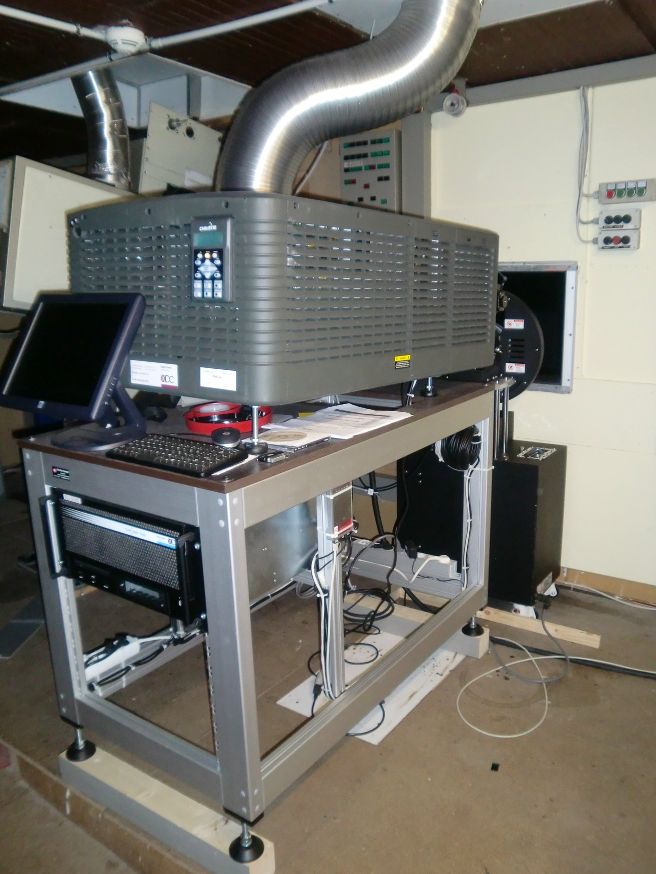 Digitaler Kinoprojektor Christie von hinten